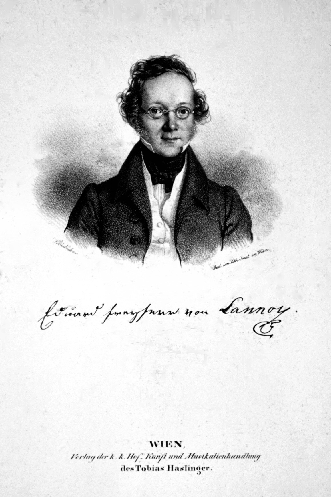 Heinrich Eduard Josef Freiherr von Lannoyl, Lithographie von Josef Kriehuber, 1837